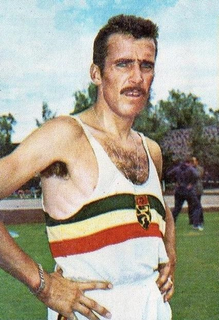 CAMPIONI dello SPORT 1969/70-n.51- ROELANTS-BELGIO-ATLETICA LEGGERA